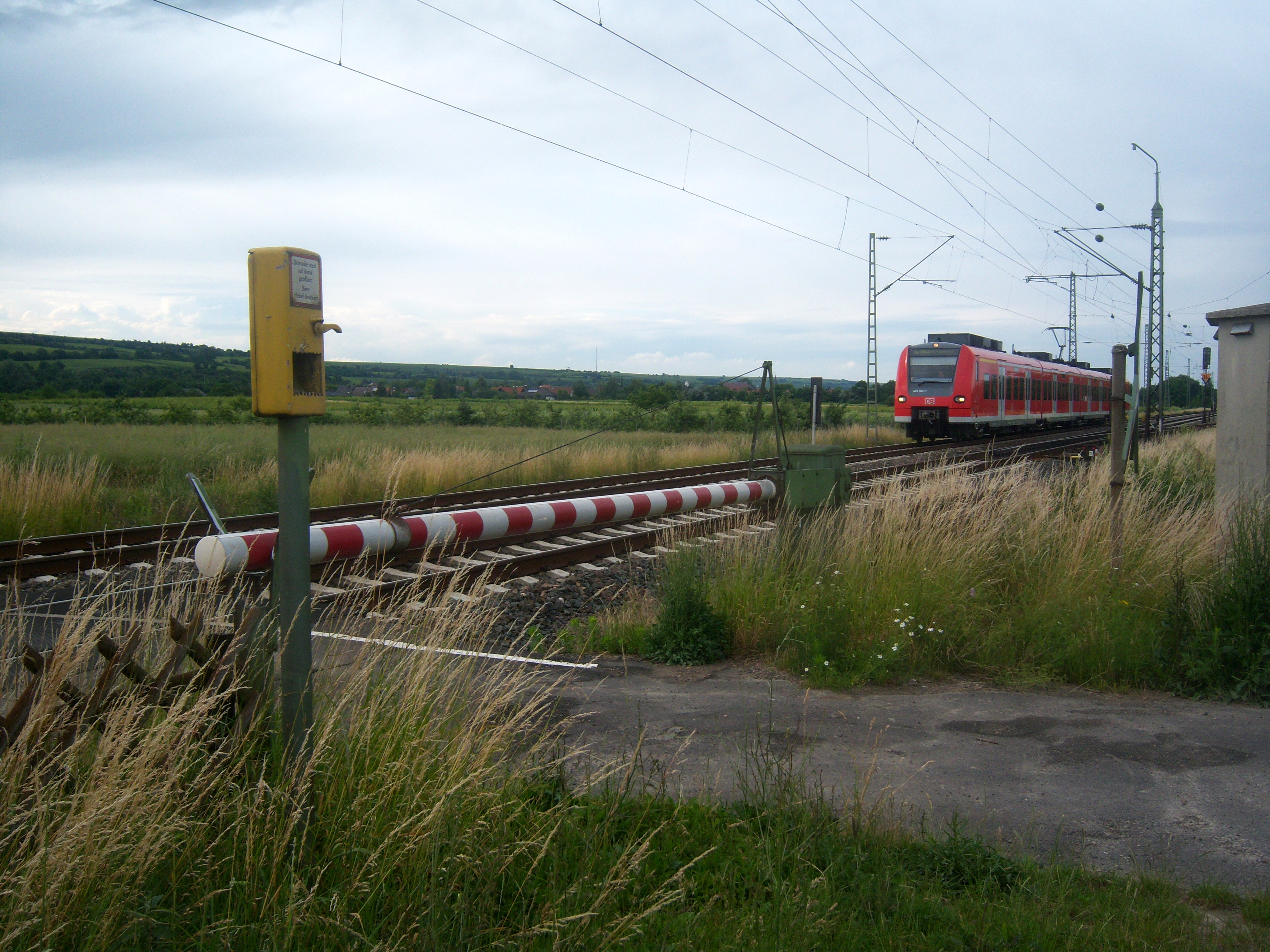 Anrufschranke auf der Bahnstrecke Mainz–Ludwigshafen südlich des Guntersblumer Bahnhofs